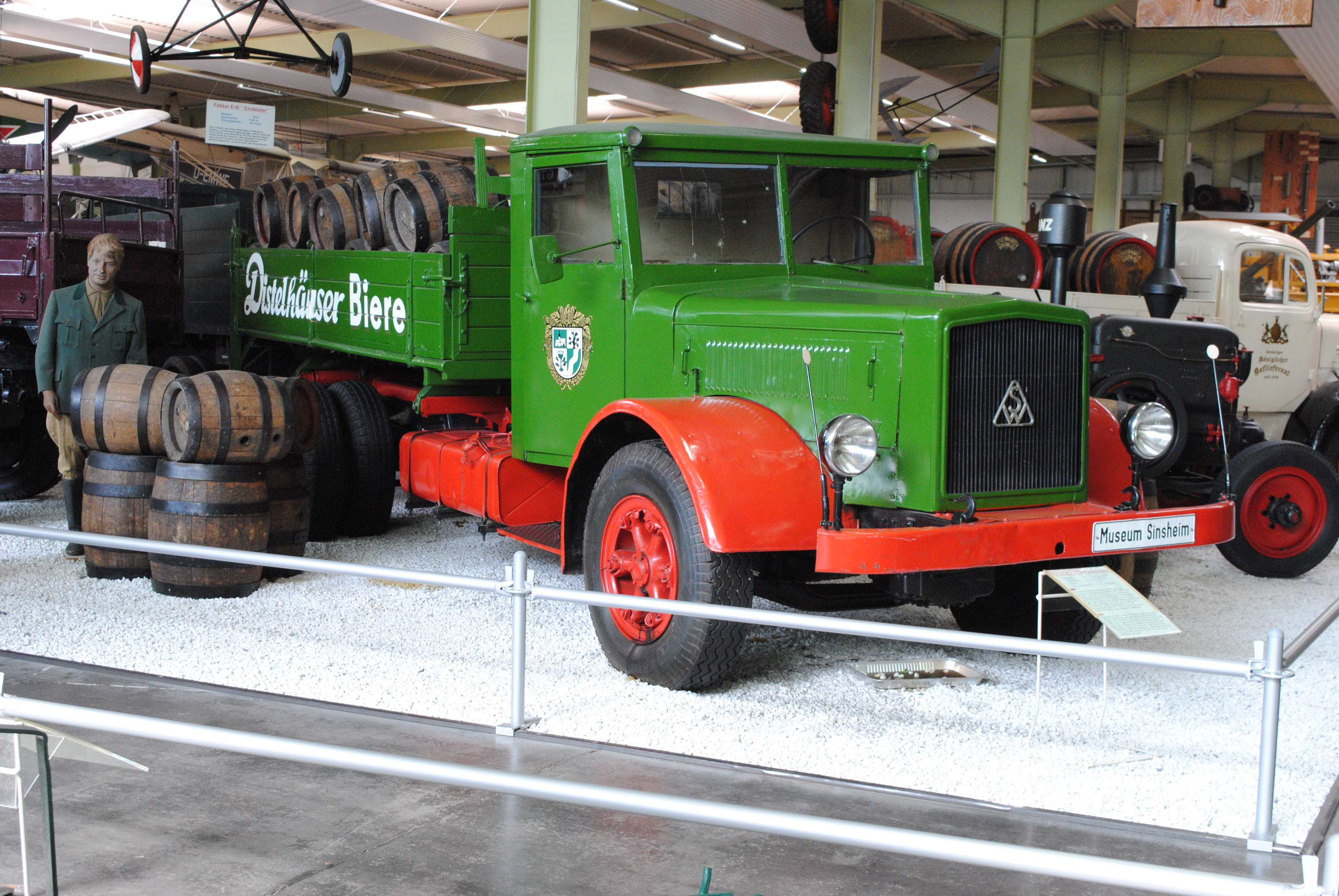 Südwerke-Lastwagen (Bj. 1946–1951) der Distelhäuser Brauerei im Technik-Museum Sinsheim.